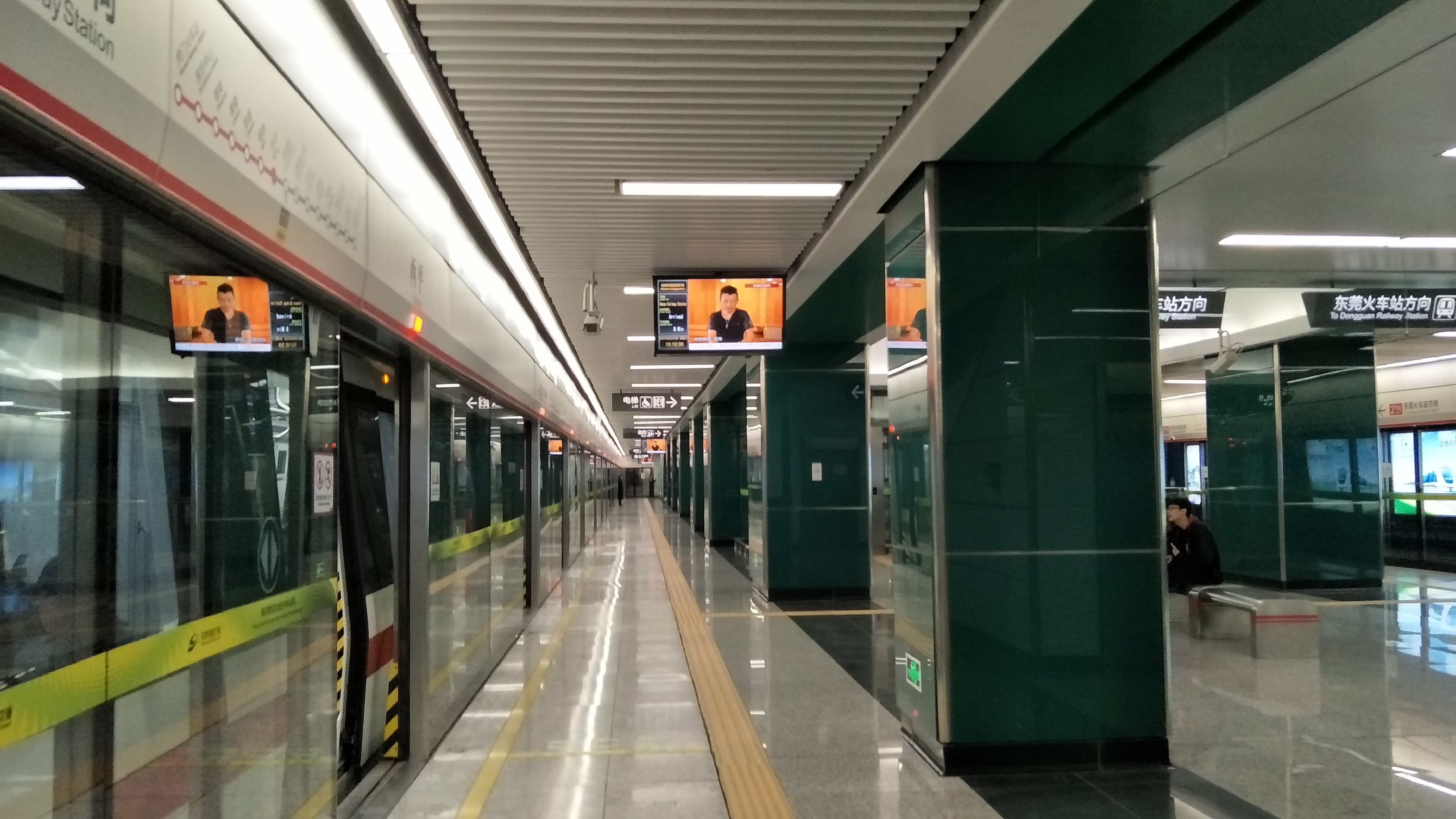 西平站月台